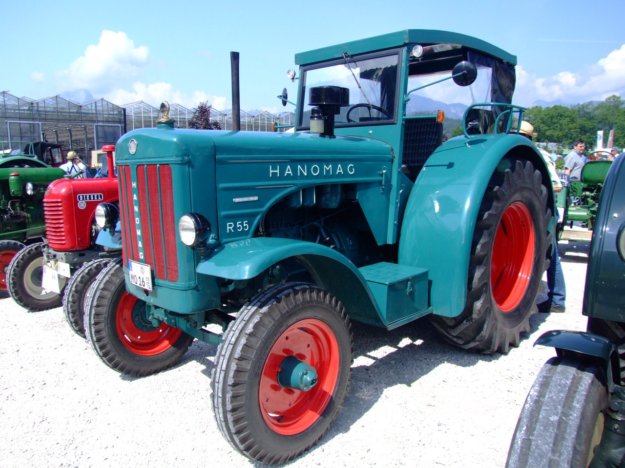 Hanomag R55, Baujahr 1955